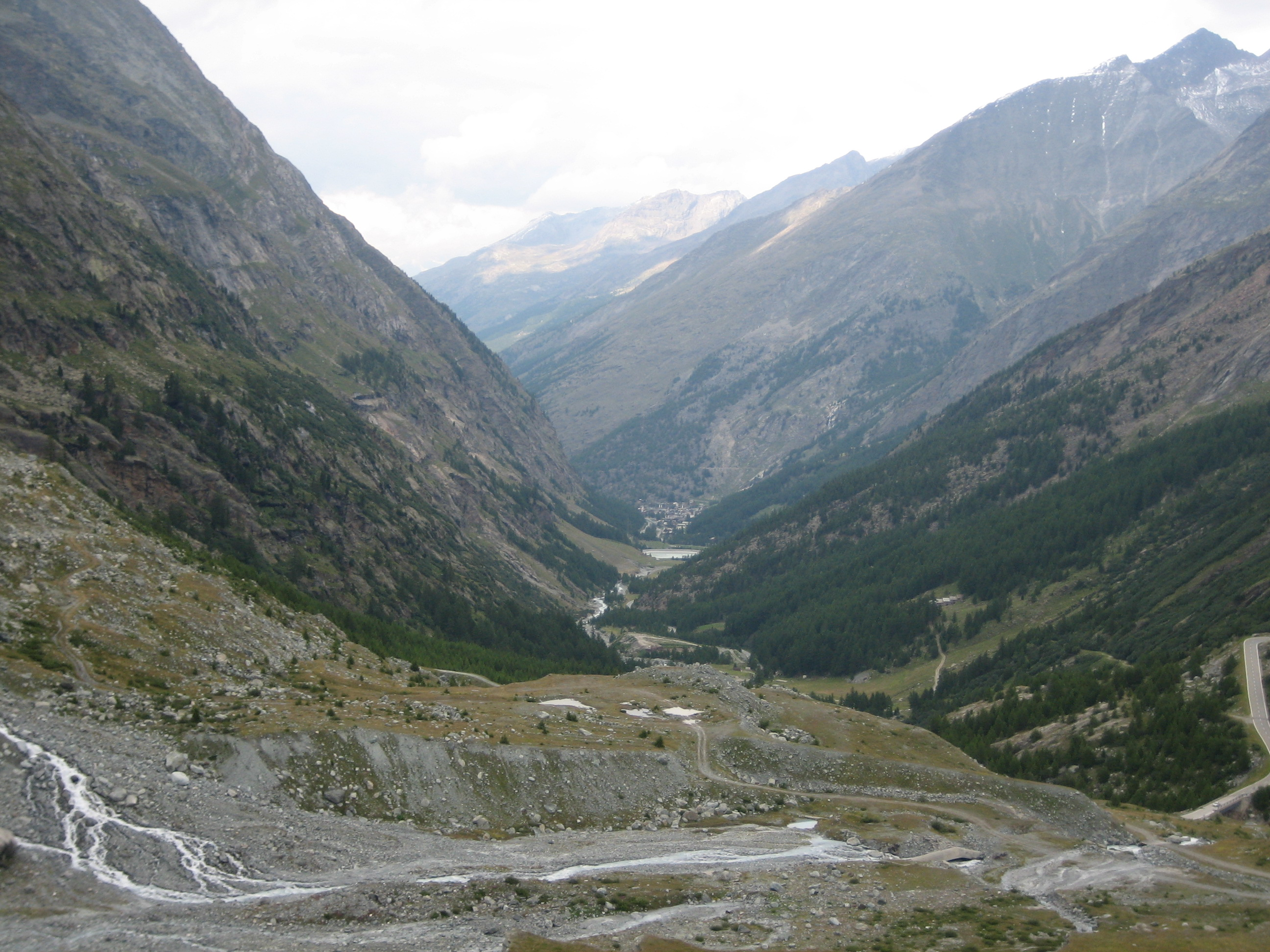 Vue sur la vallée de Saas depuis le barrage de Mattmark